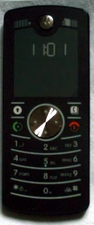 Un portable de Motorola F3.